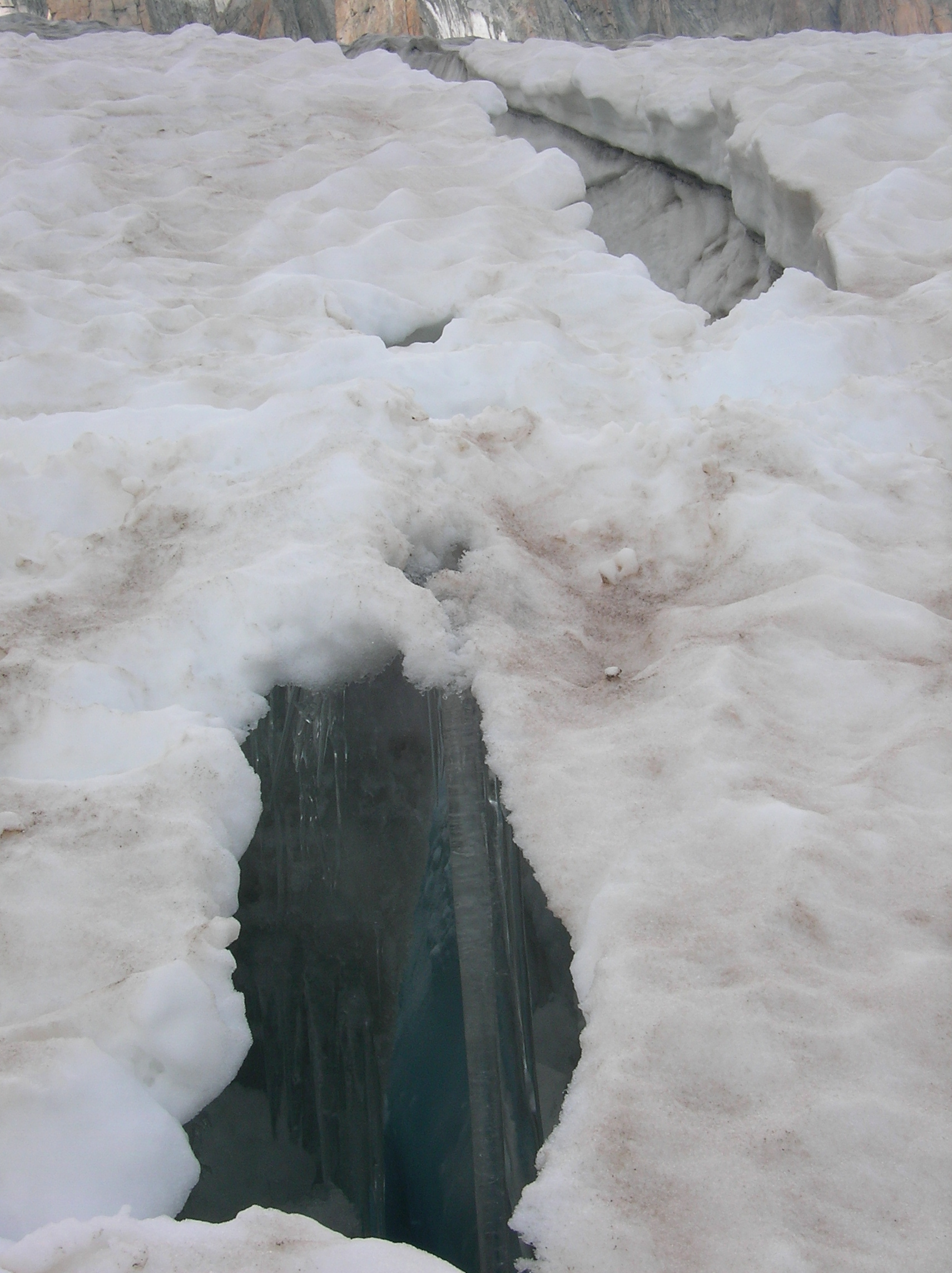 Crevasse at a glacier in Vallée Blanche (White Valley), Chamonix-Mont-Blanc, France Gletscherspalte mit Schneebrücke im Vallée Blanche bei Chamonix-Mont-Blanc